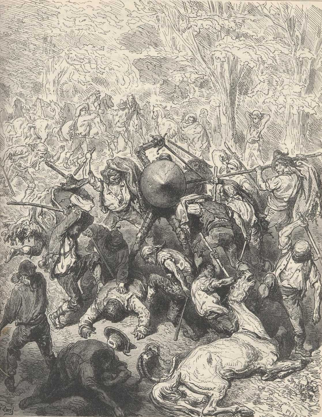 Dom Quixote luta com os iangueses